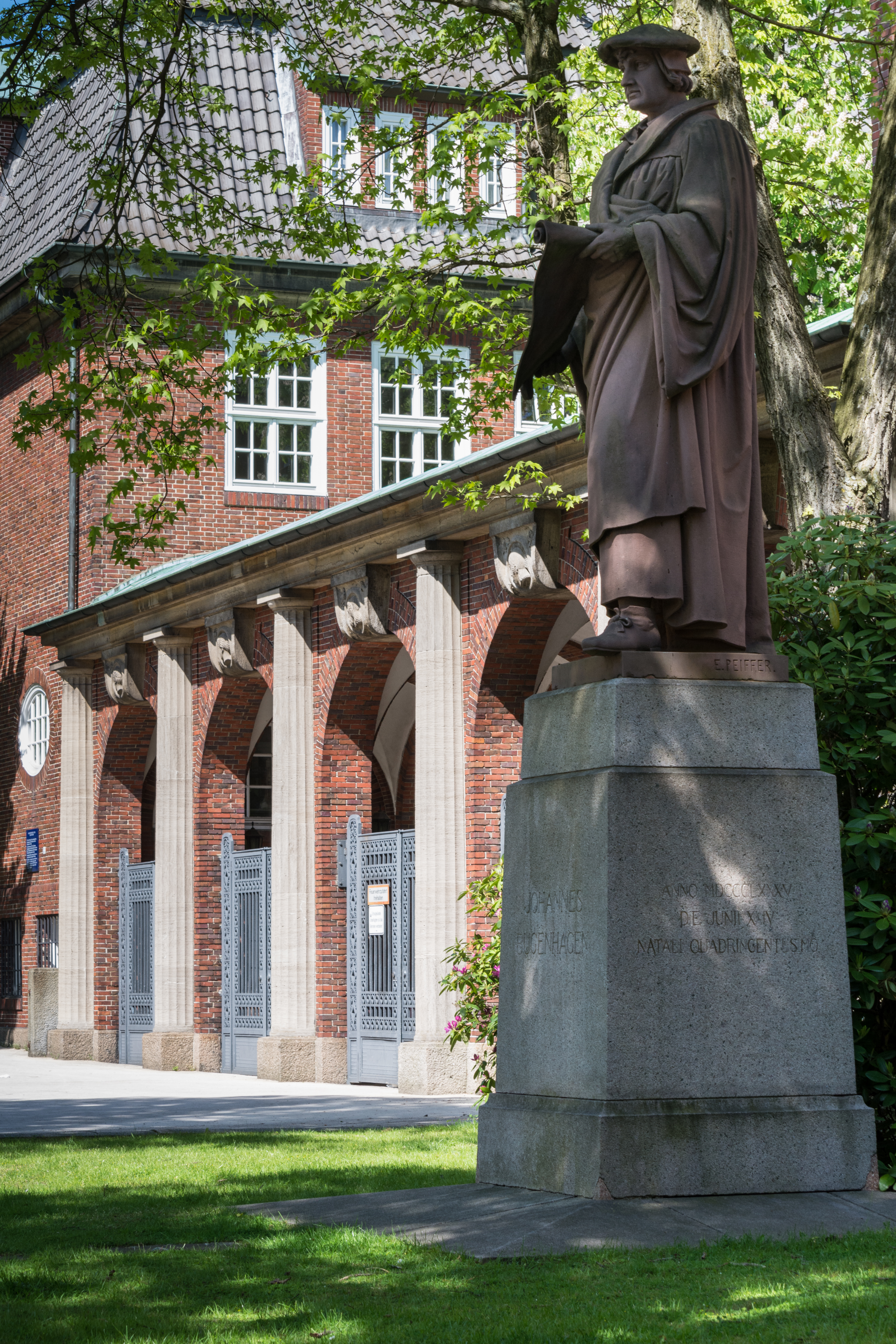 Bugenhagendenkmal von Engelbert Peiffer vor der Gelehrtenschule des Johanneums in Hamburg-Winterhude. This is a photograph of an architectural monument.